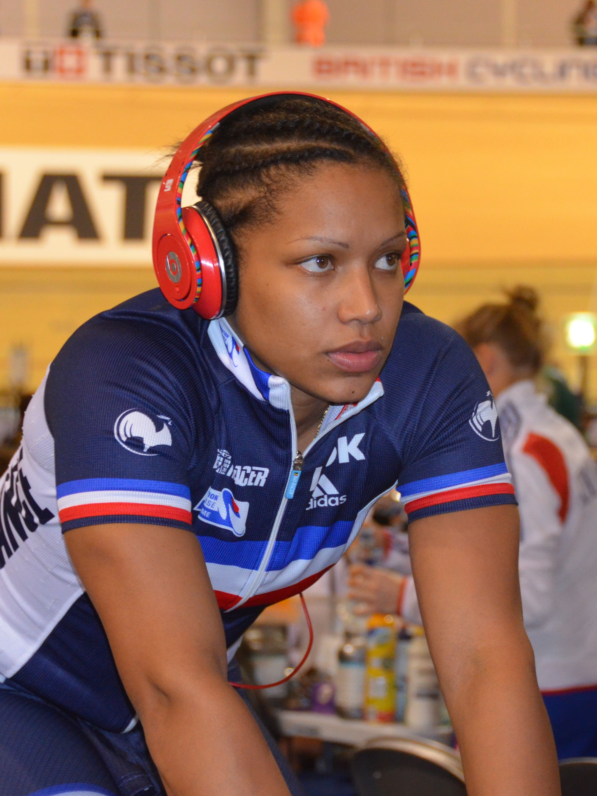 Olivia Montauban, französische Radsportlerin